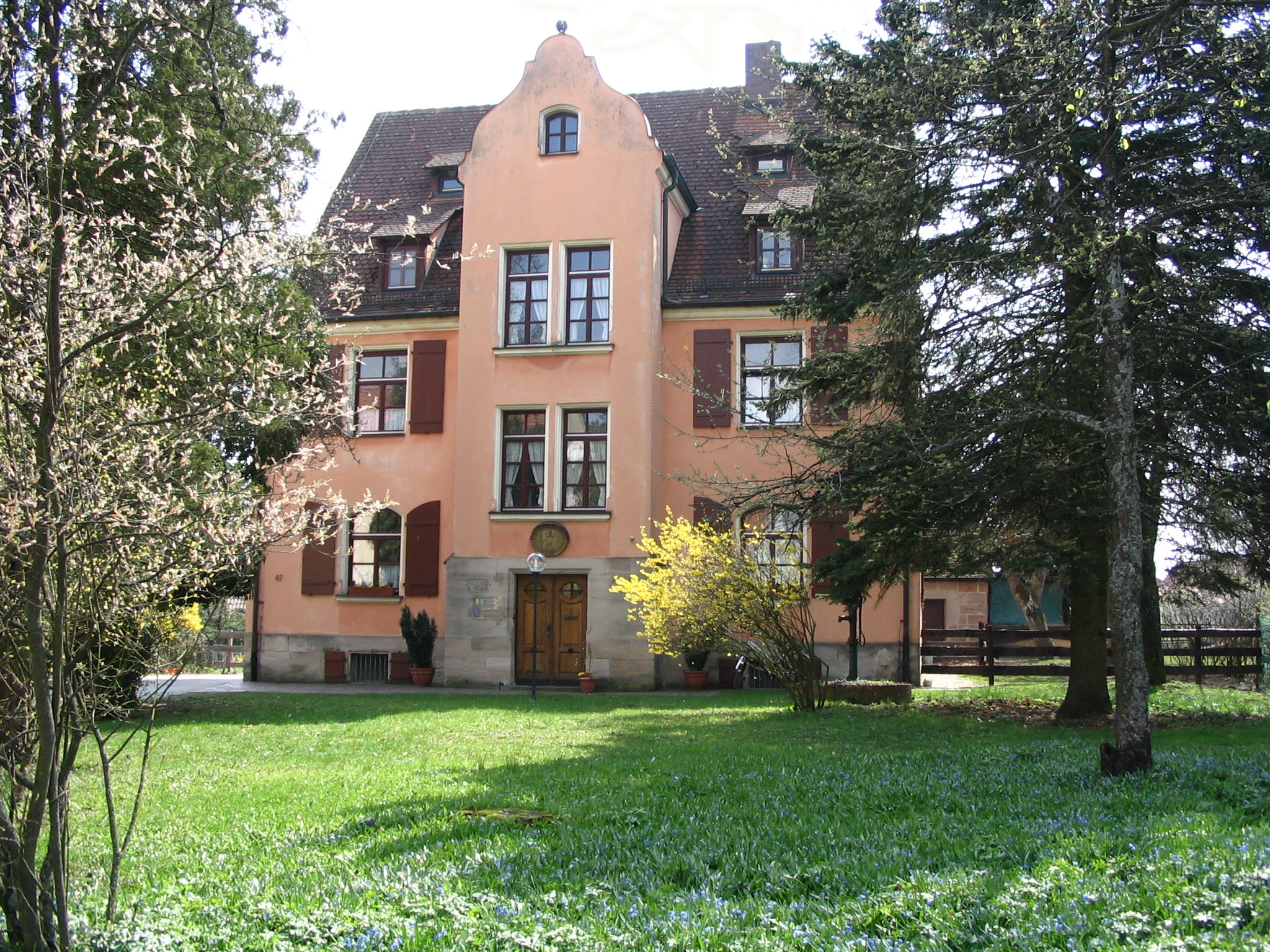 Pfarrhaus Oberferrieden